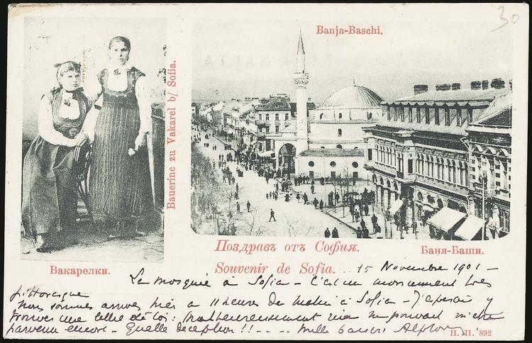 Вакарелки и Баня Баши джамия